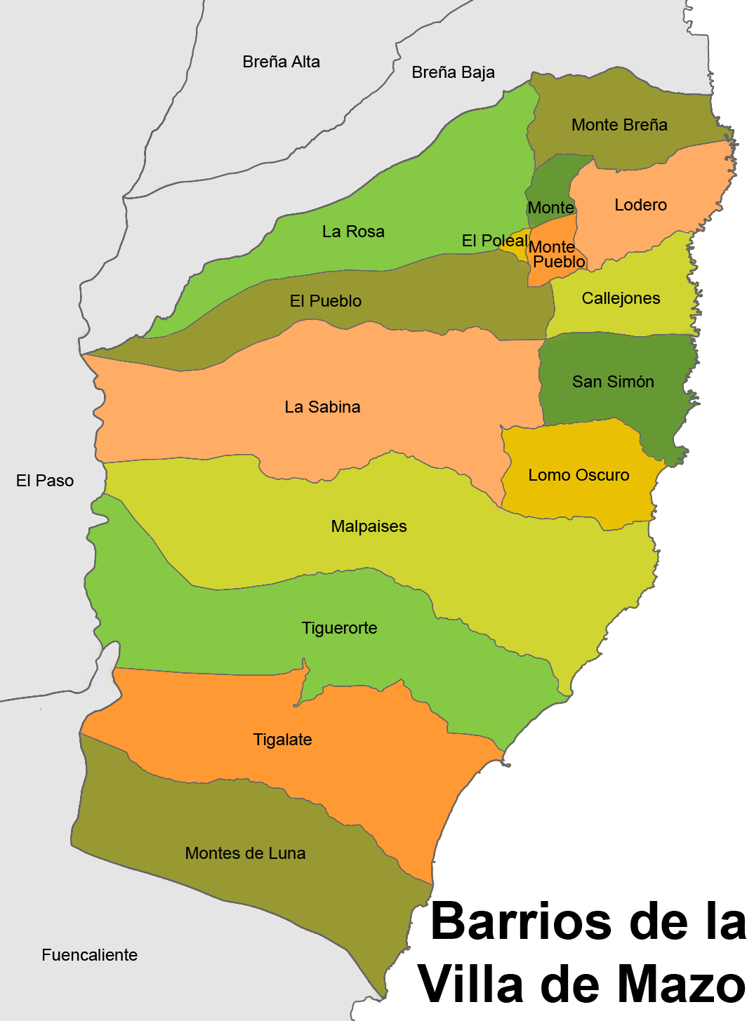 Mapa Barrios de la Villa de Mazo